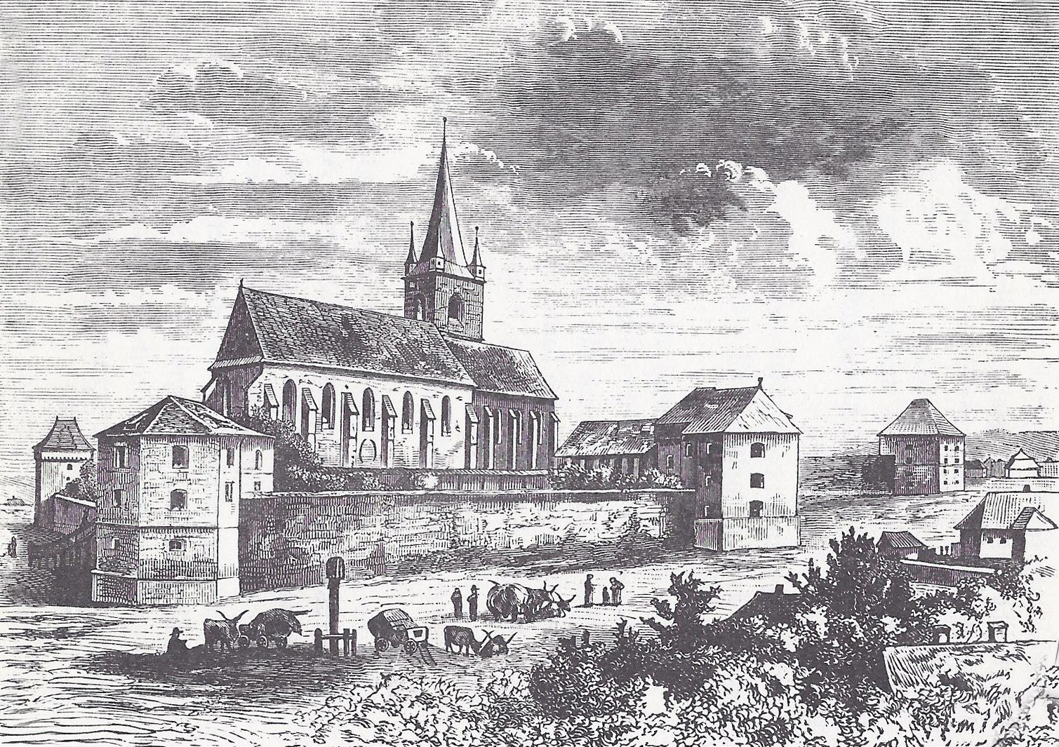 Gravure de 1860 représentant l'église réformée (Vártemplom) au sein de la citadelle de Târgu Mureș/Marosvásárhely.